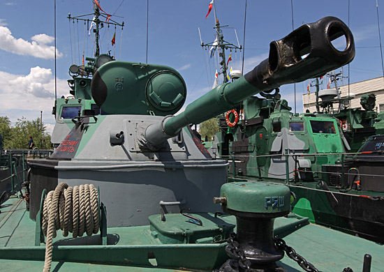 Проекта 1204 "Шмель" - Дивизионом артиллерийских катеров охраны водного района Каспийской флотилии